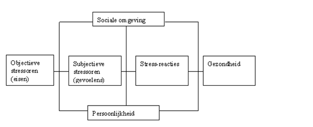 Michigan-model van Kaplan